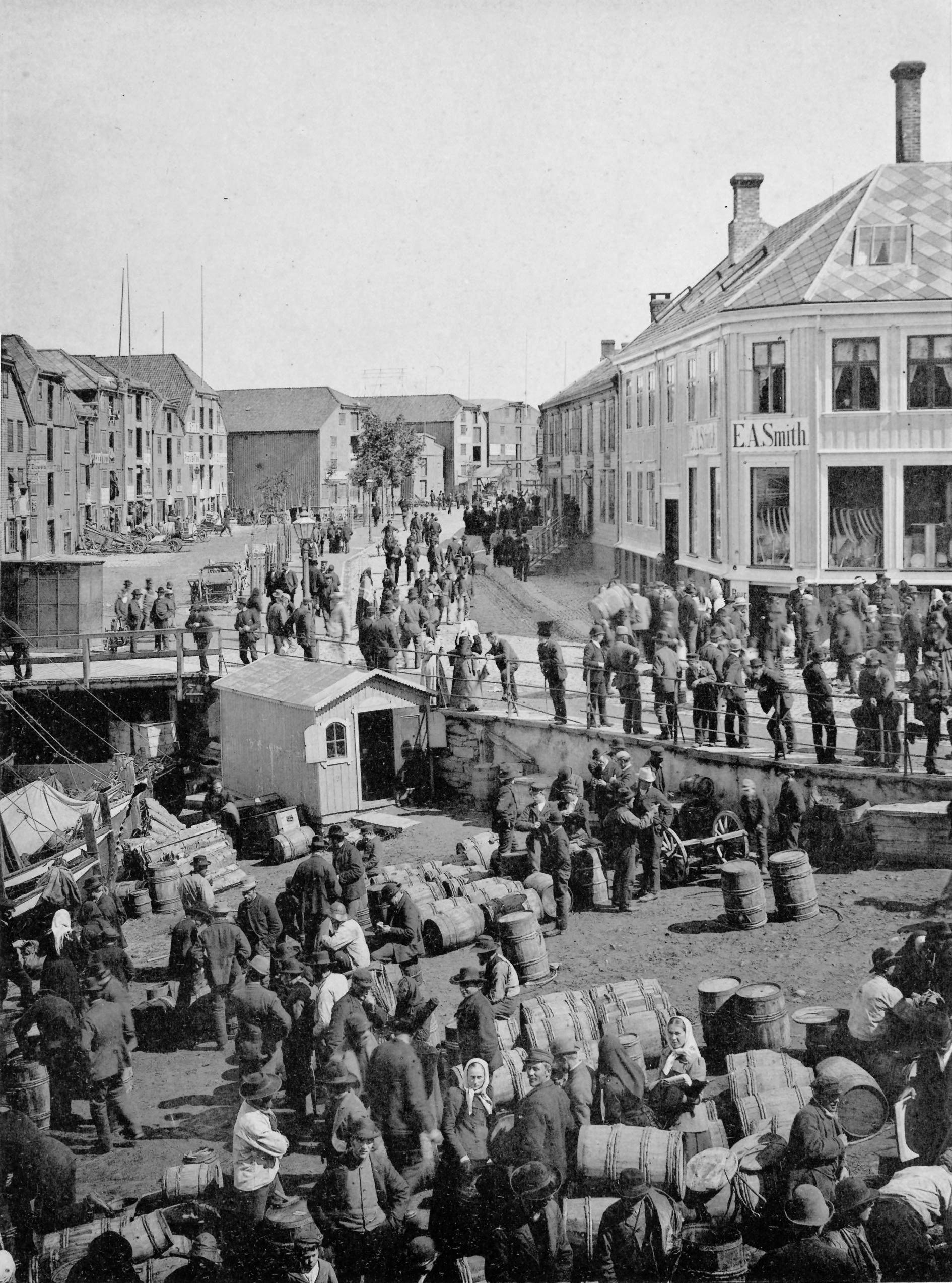 Ravnkloen (Fisketorvet) og Fjordgaden